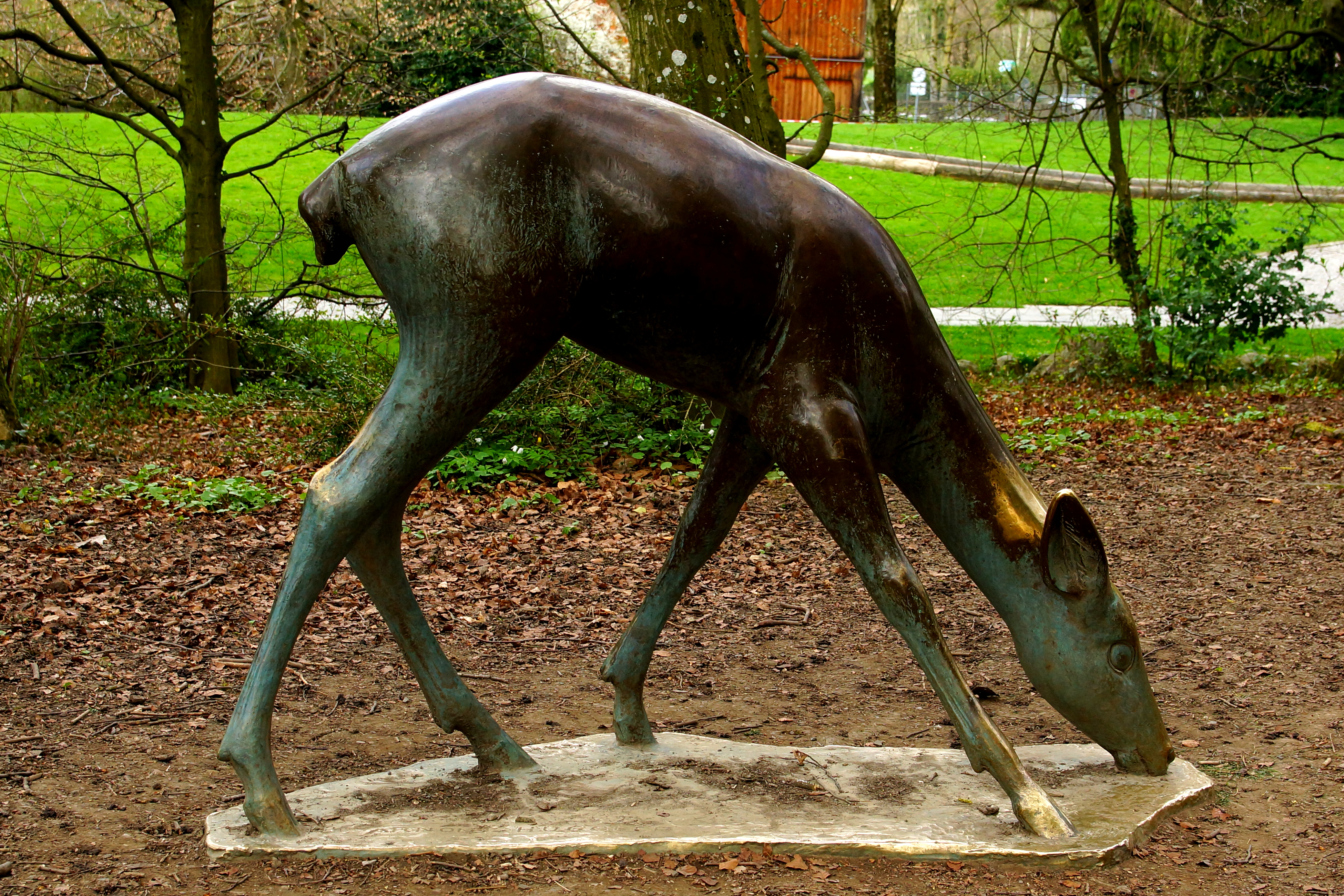 im Park im Grüene (Zürich) geschaffen von Arnold Huggler